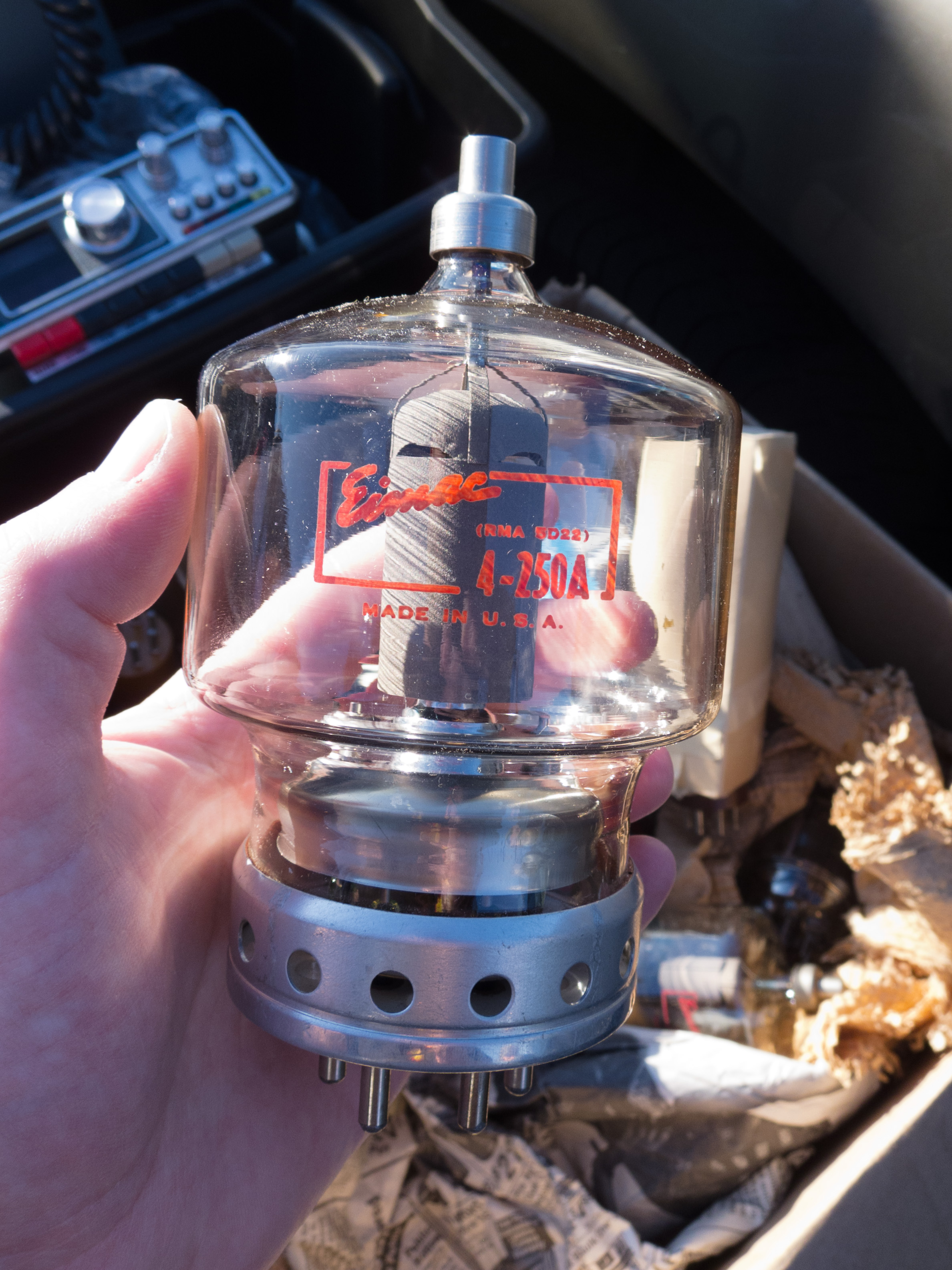 Eimac 4-250A power tetrode